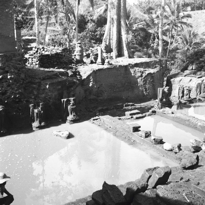 negatief. Badplaats bij de Pura Goa Gajah of Olifantsgrot